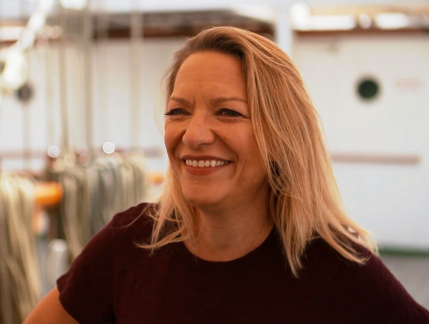 Mehr zur Preisträgerin: Weitere Informationen über den Communicator-Preis: Mehr DFG-Filme bei "DFG bewegt": Das Video zum Download